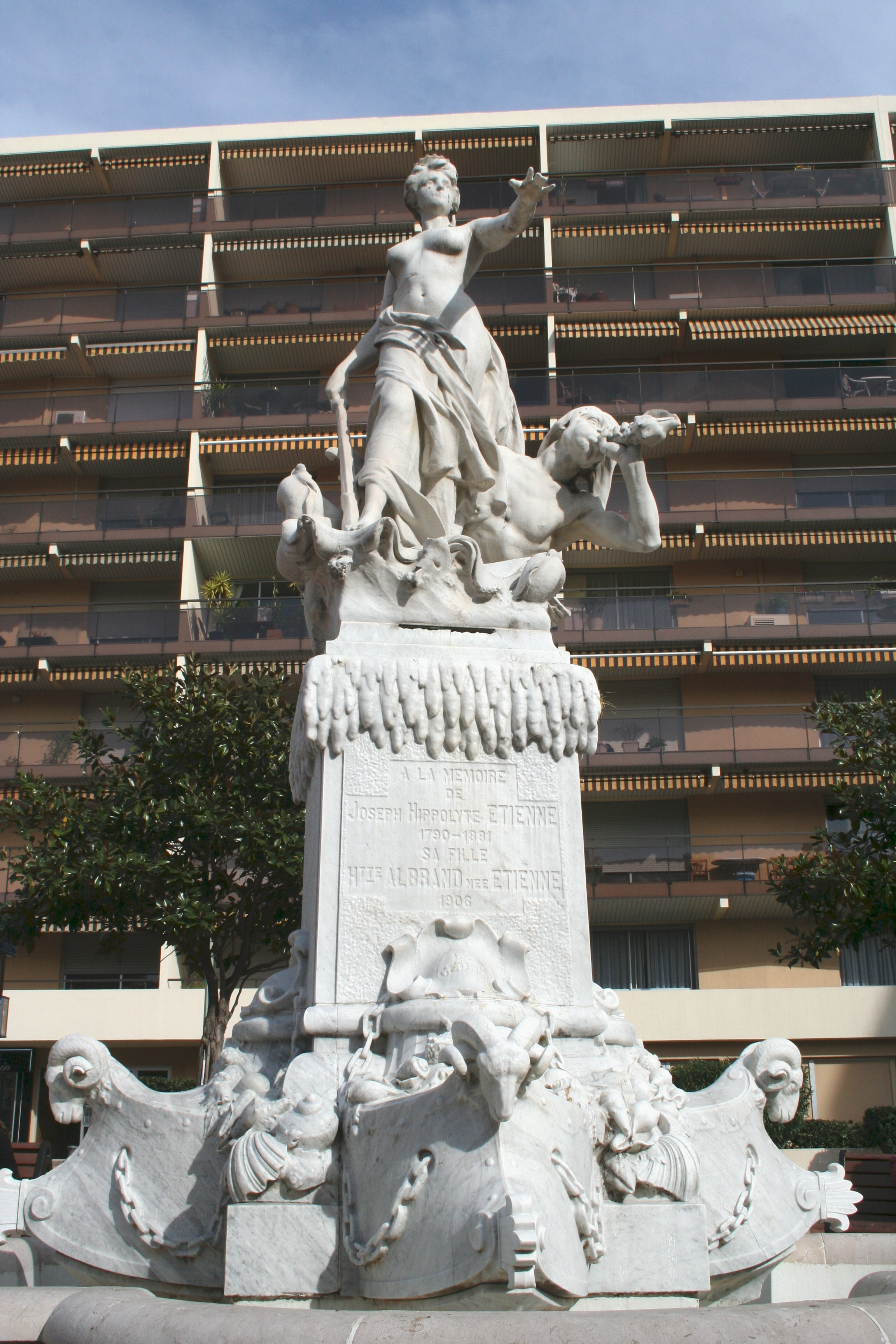 Fontaine d'Amphitrite sculptée par Auguste Carli située place Joseph Etienne à Marseille. Fontaine inaugurée en 1906.